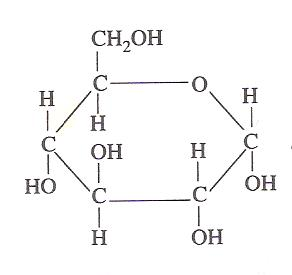 Aquí les dejo la estructura de la glucosa, en su forma piranósica.